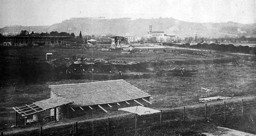 La prima sede della Romulea in zona Parioli in quello che sarebbe diventato successivamente l'ippodromo di Villa Glori